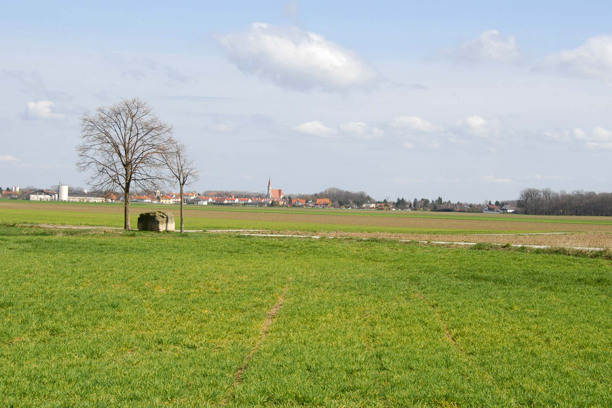 Gedenkstein bei der ehemaligem Kriegsfleckbrücke über den zugeschütteten Pöttschinger Ast des Wiener Neustädter Kanals. Der Name Kriegsfleck soll an jene Schlacht an der Leitha erinnern, in der 1246 der letzte Babenberger (Friedrich der Streitbare) im Kampf gegen den Ungarkönig Bela IV. fiel. Im Hintergrund die Ortschaft Lichtenwörth.